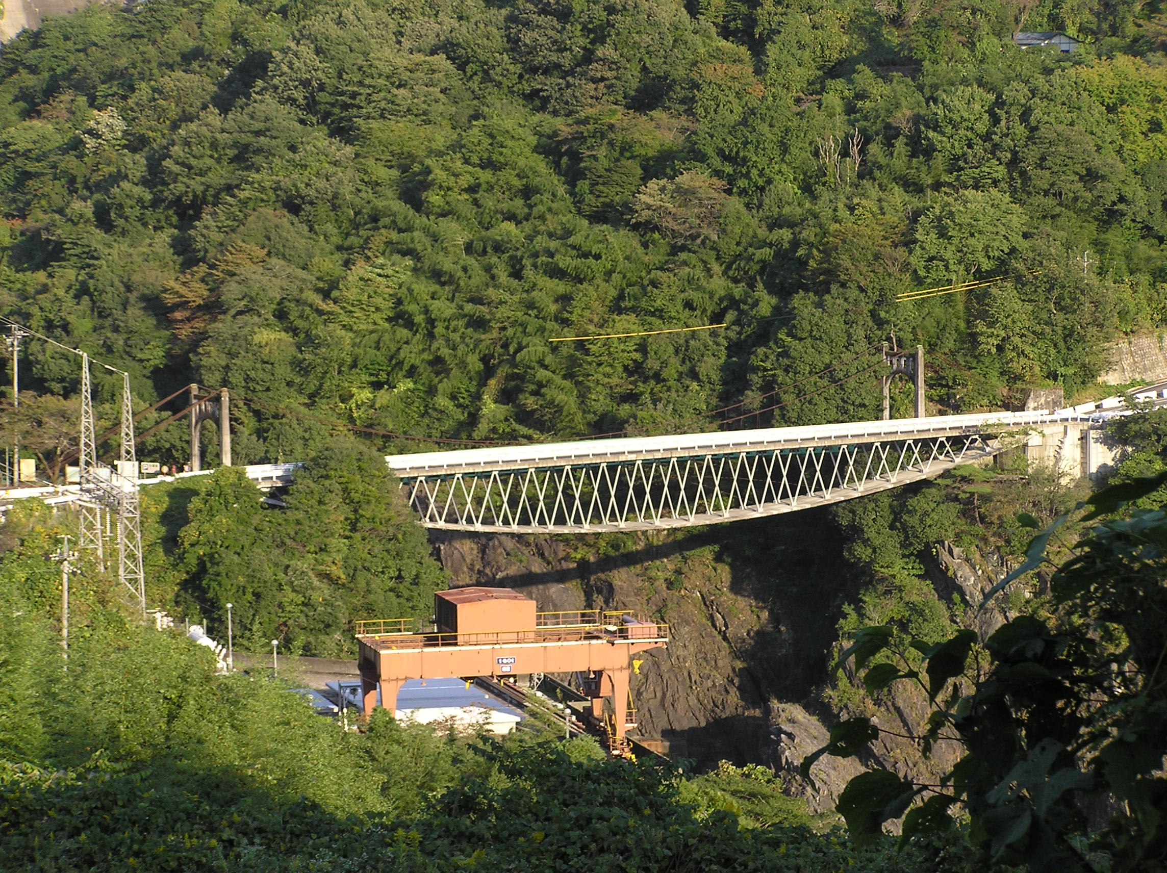 のぞみ橋(岐阜県可児郡御嵩町、加茂郡)